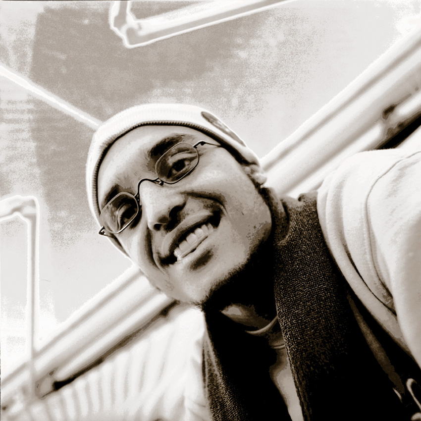 Rapper Raptile 2001 in Hamburg